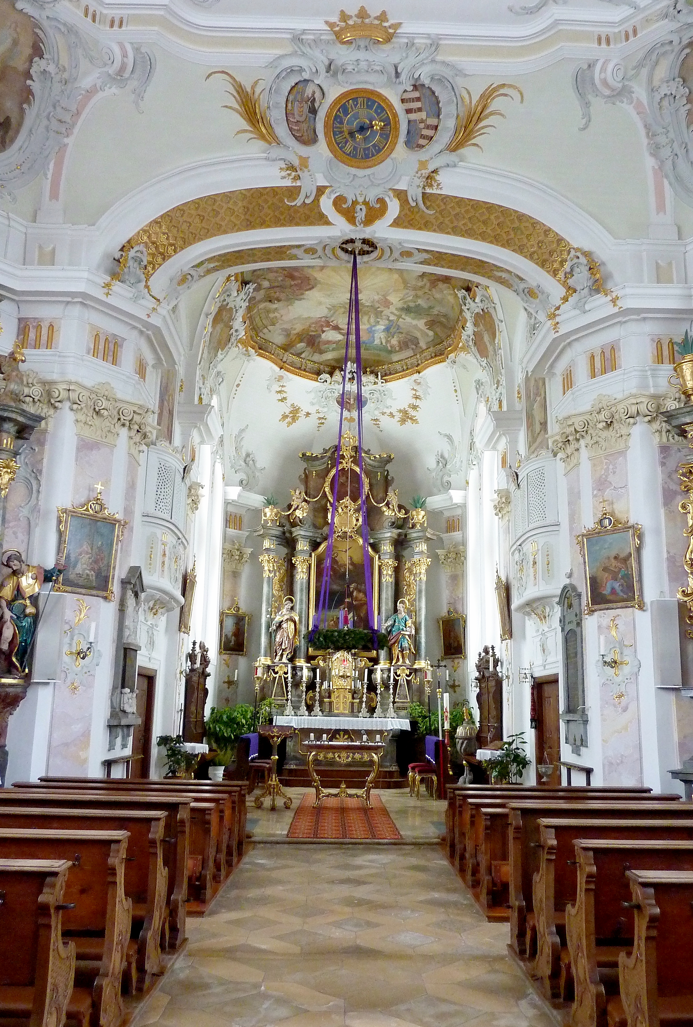 Katholische Pfarrkirche St. Nikolaus in Oberndorf am Lech, einer Gemeinde im Landkreis Donau-Ries (Bayern), Innenraum mit Blick zum Chor